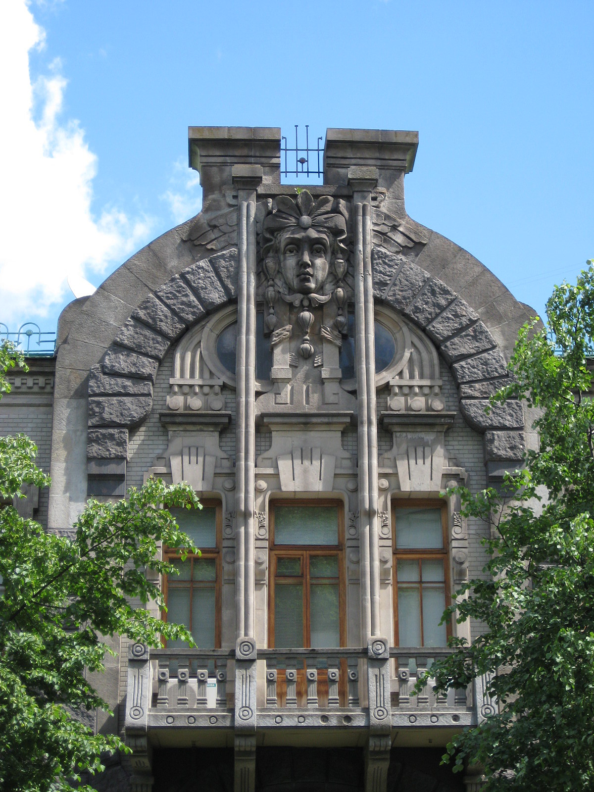 Особняк Аршавського («Будинок невтішної вдови»), Київ, Лютеранська вул., 23